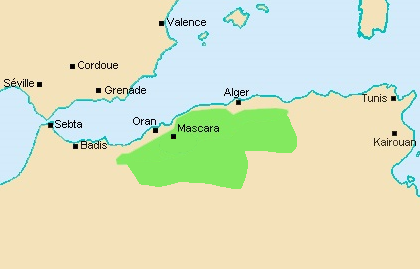 Map of Emir Abd el-Kader state between 1836 and 1839. Alexandre Bellemare: Abd el Kader, sa vie politique et militaire. P200-226